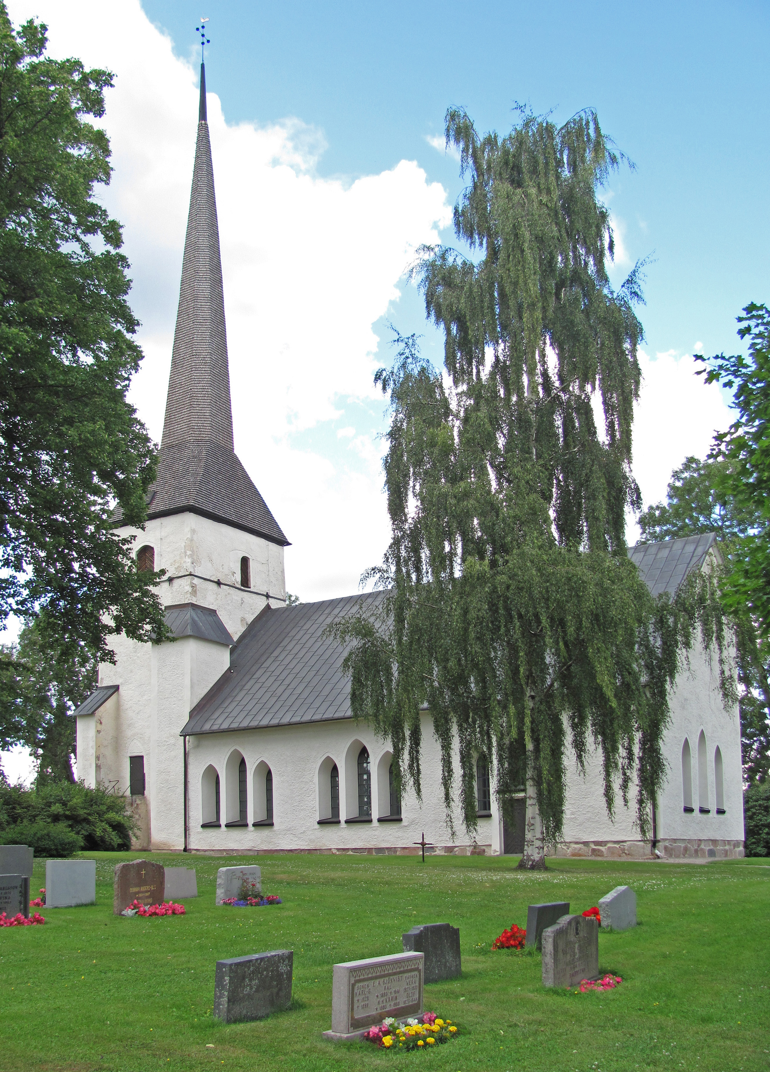 Medåkers kyrka